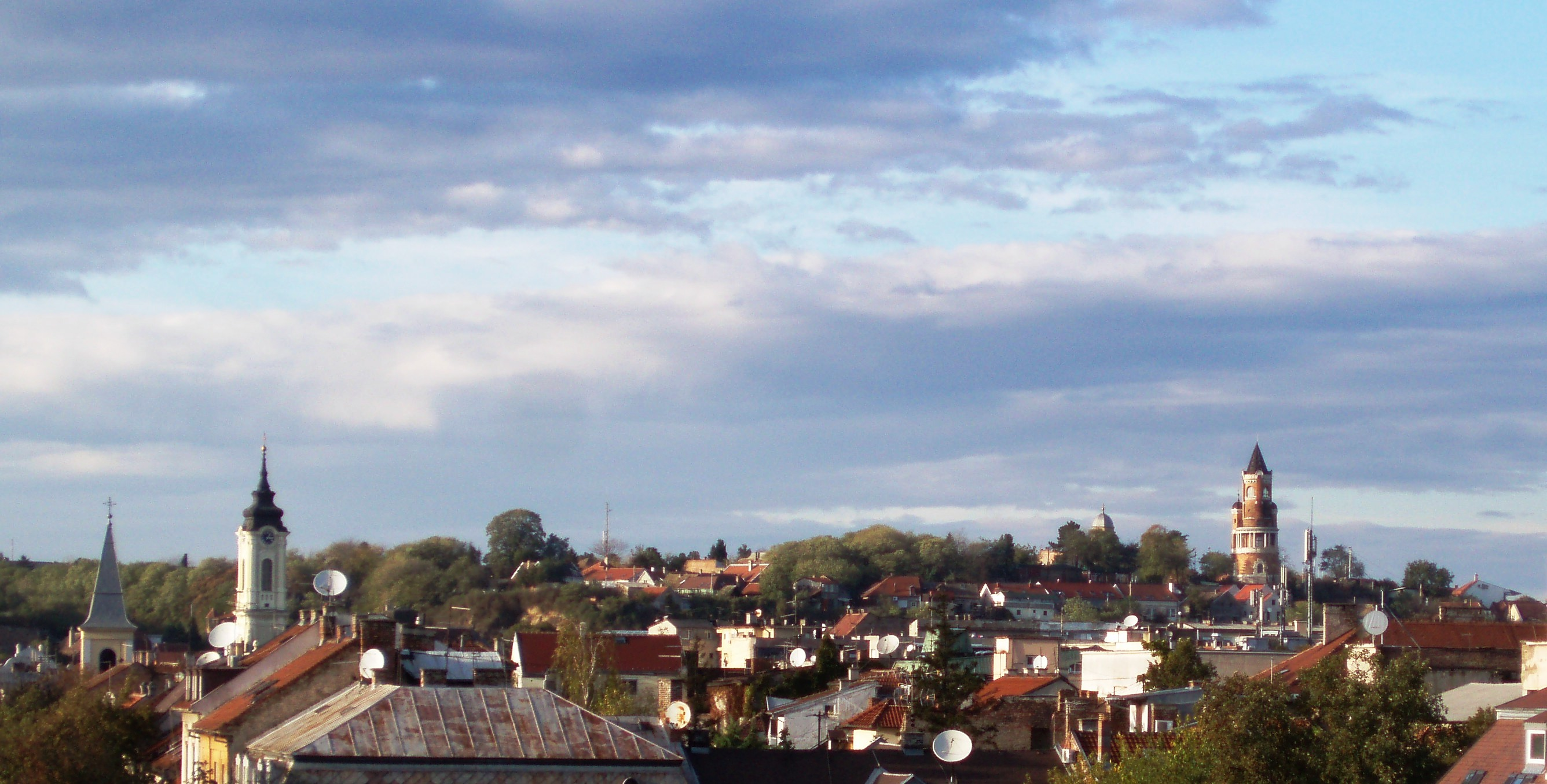 Gardoš - panorama, autor fotografije: Nicolo